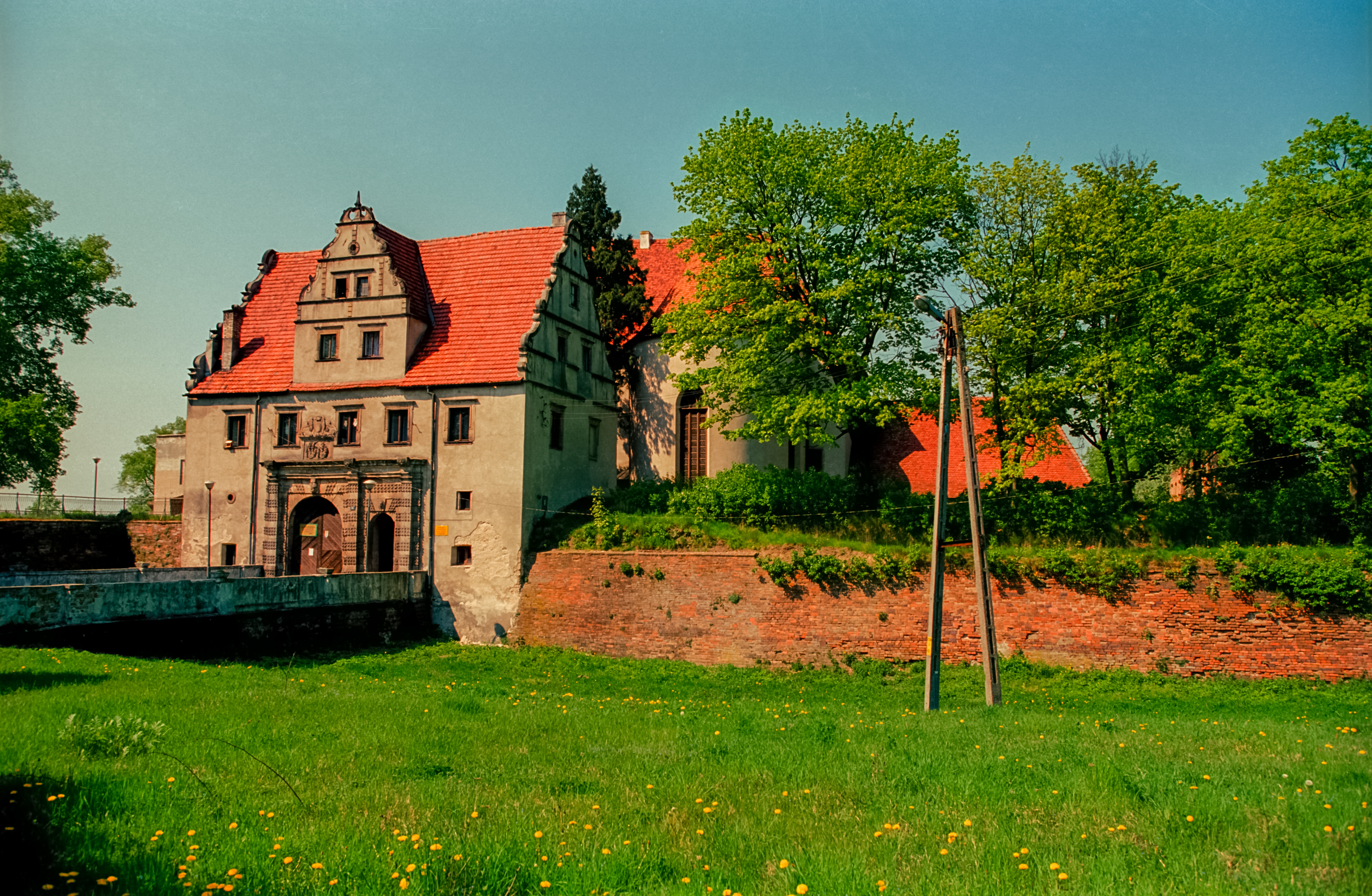 Siedlisko